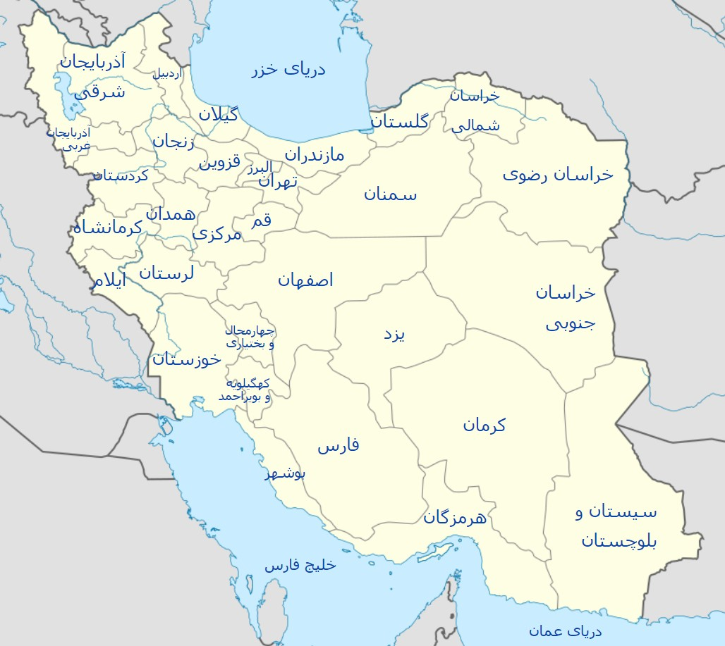 نقشه فارسی ایران.